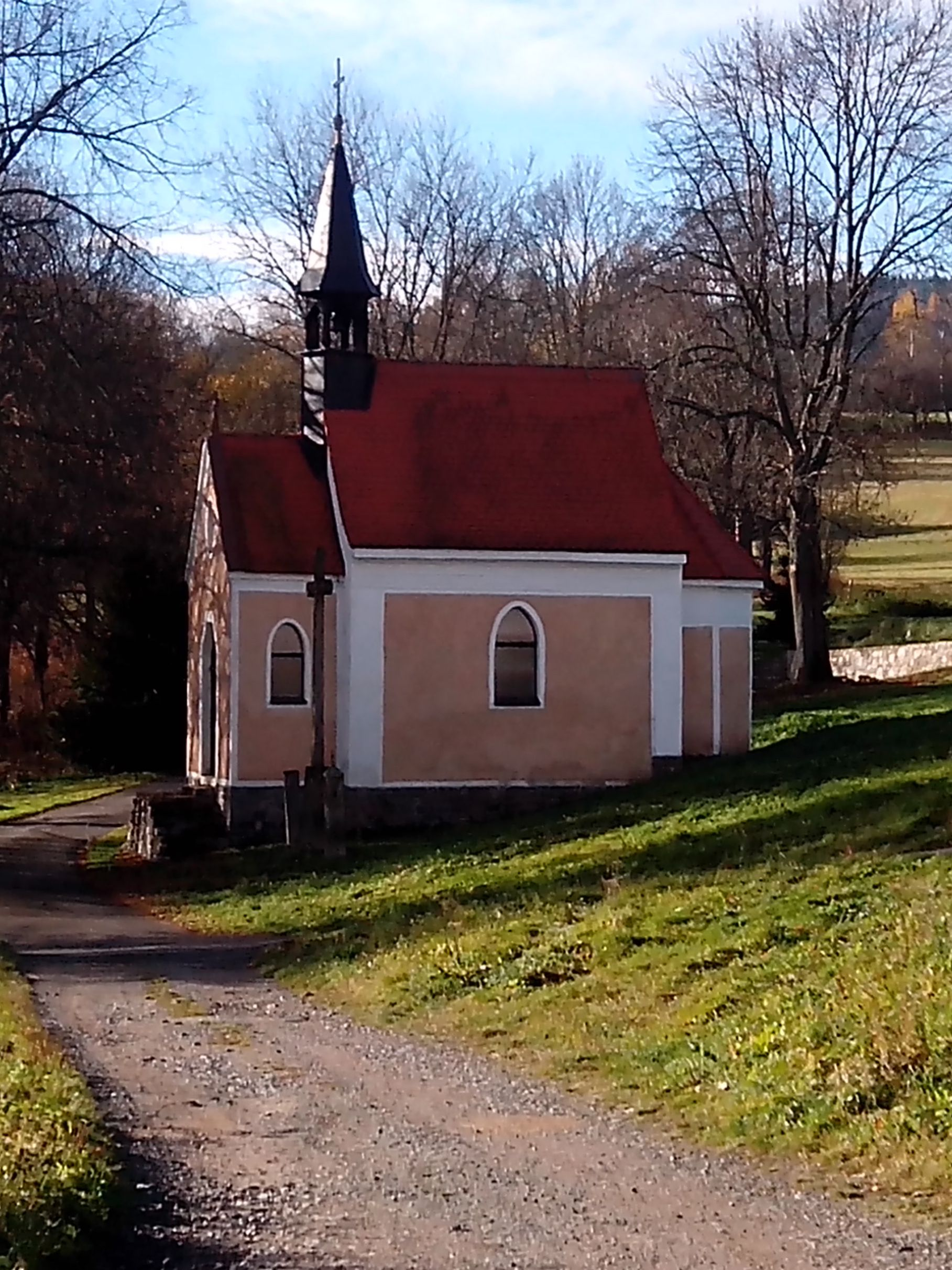 Kaple svaté Anny (Stará Lipka)